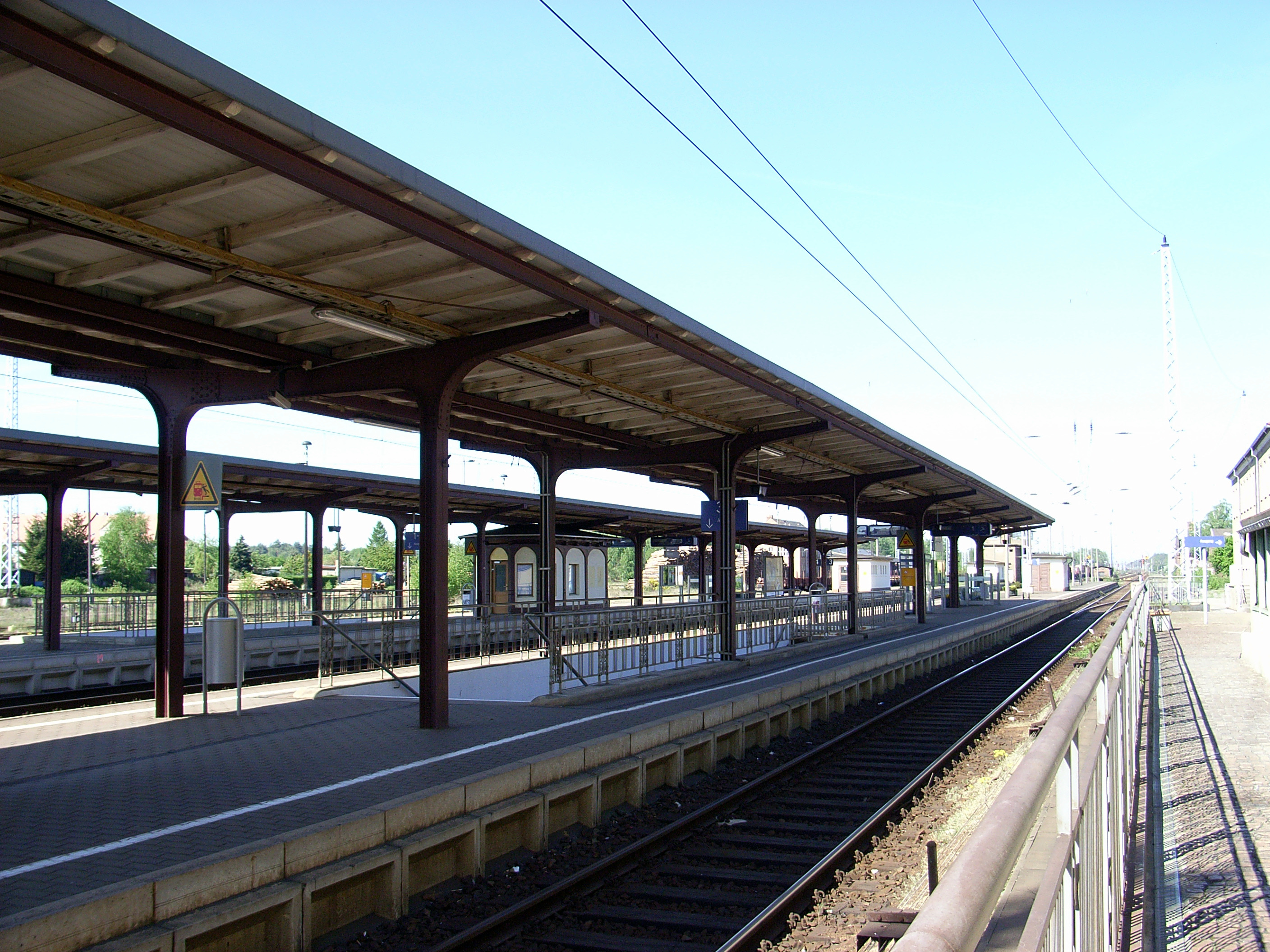 Bahnsteig 1 des Bahnhofs Hoyerswerda